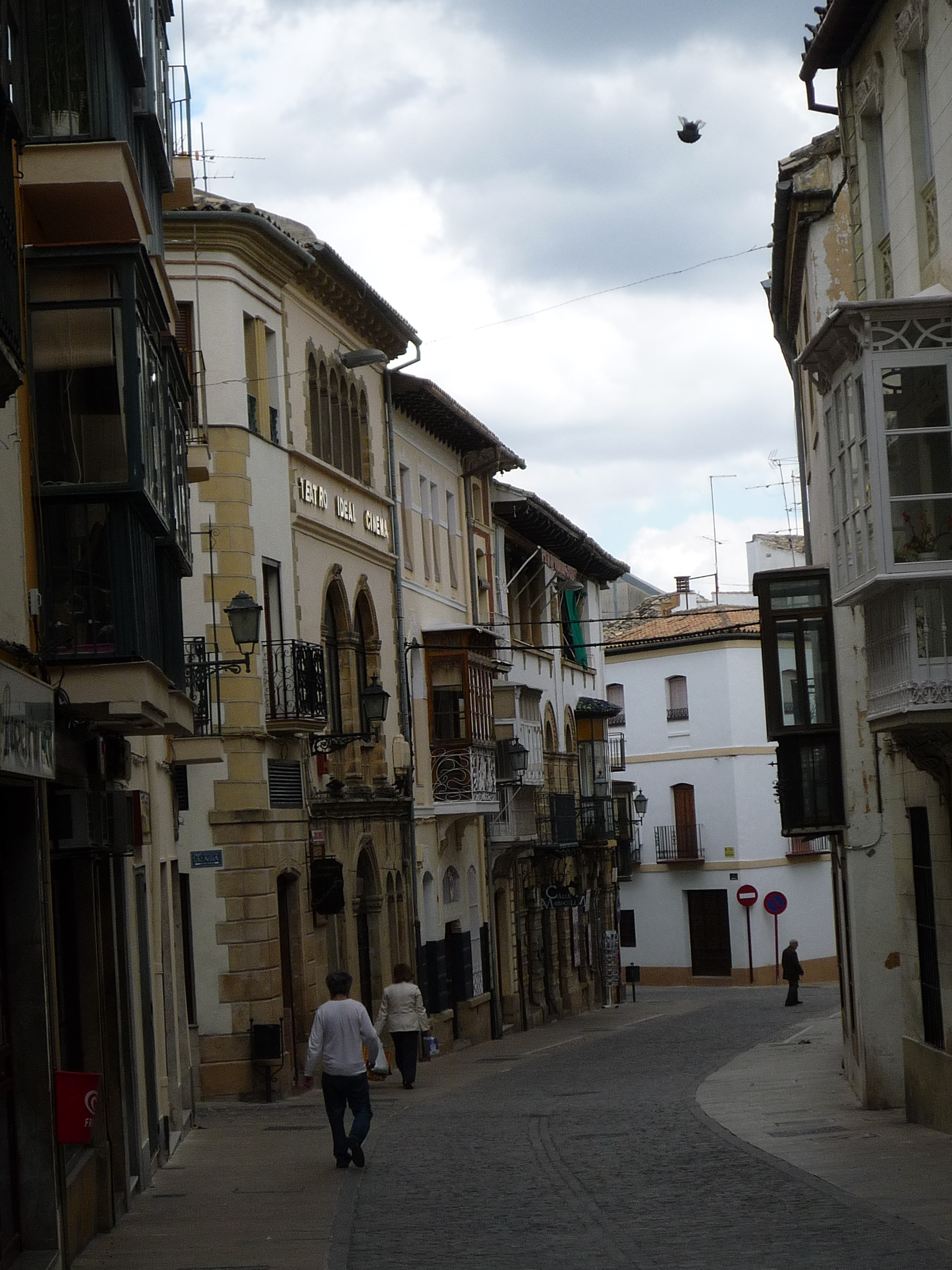 Die Calle Real, eine der Einkaufsstraßen im Altstadtzentrum von Úbeda. See more about in a related article (DE) of my travelblog.